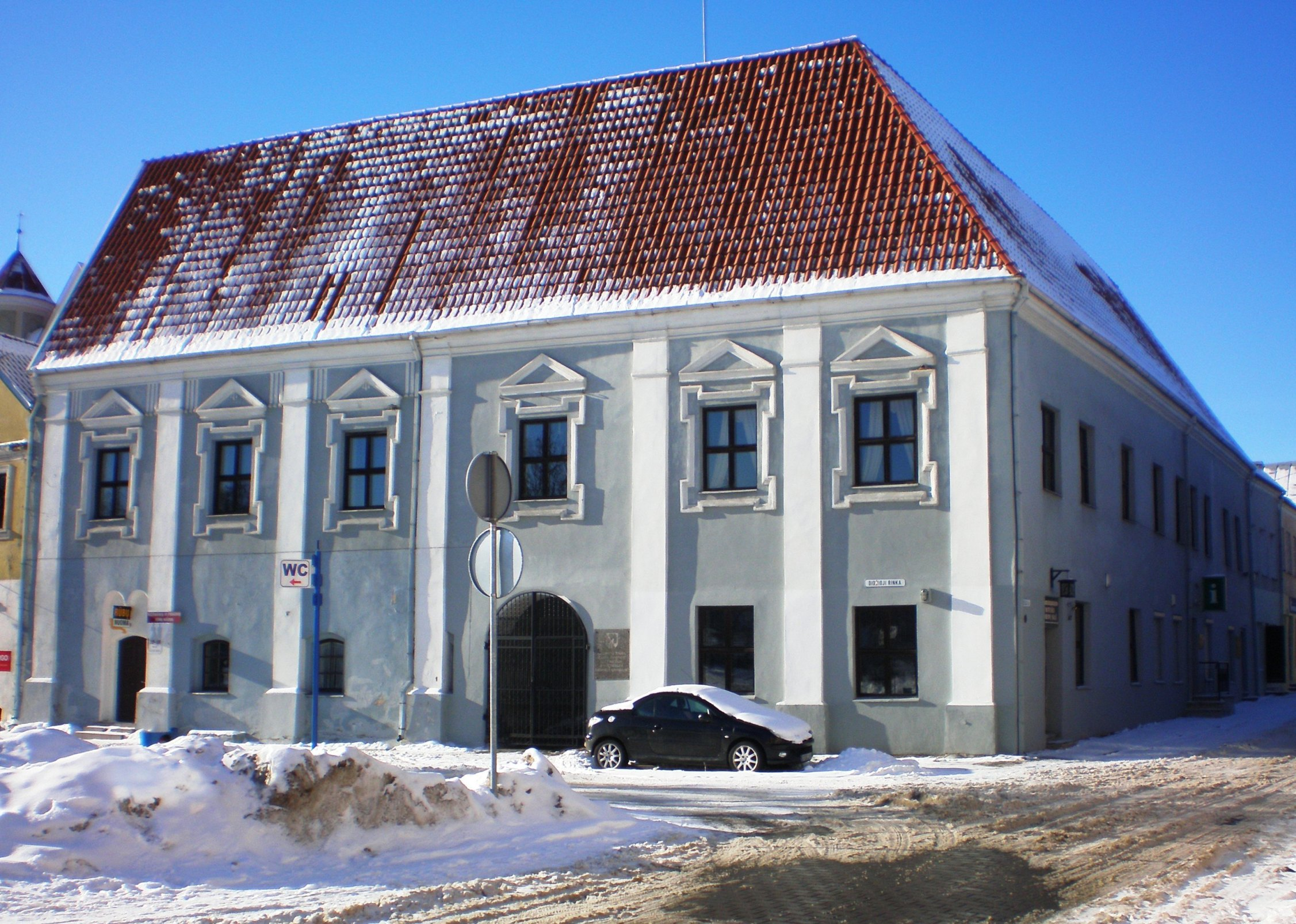 Kėdainių rotušė žiemą